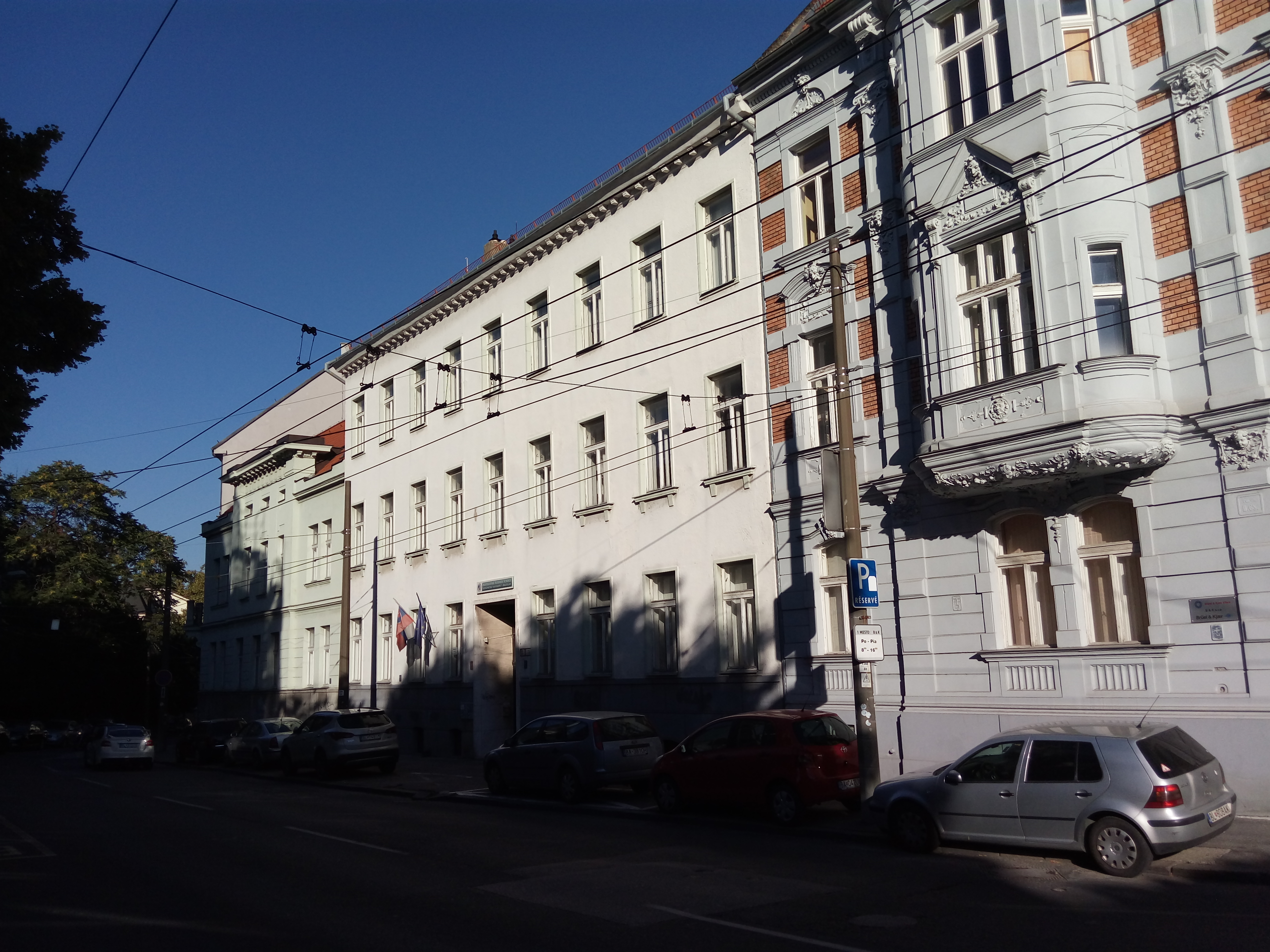 Palisády 22, Staré Mesto, Bratislava